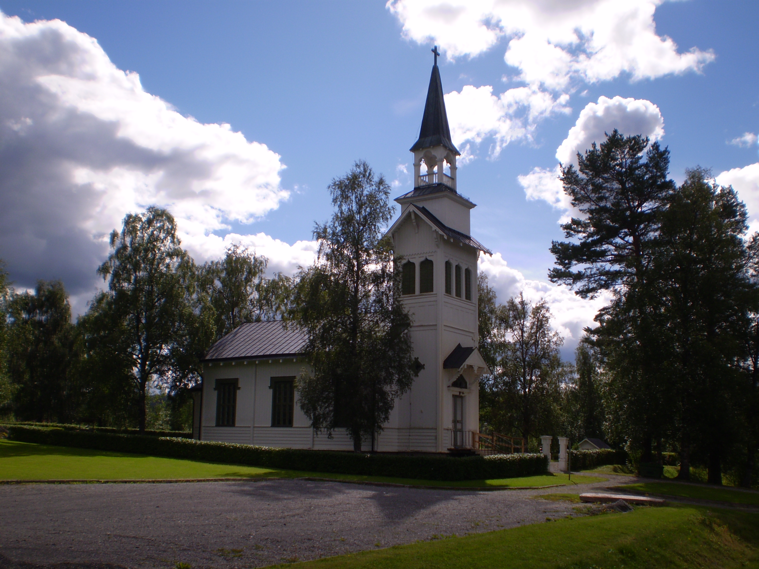 Gillhovs Kyrka